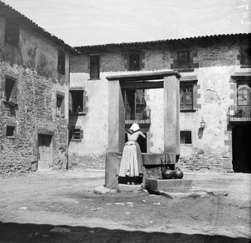 Imatge